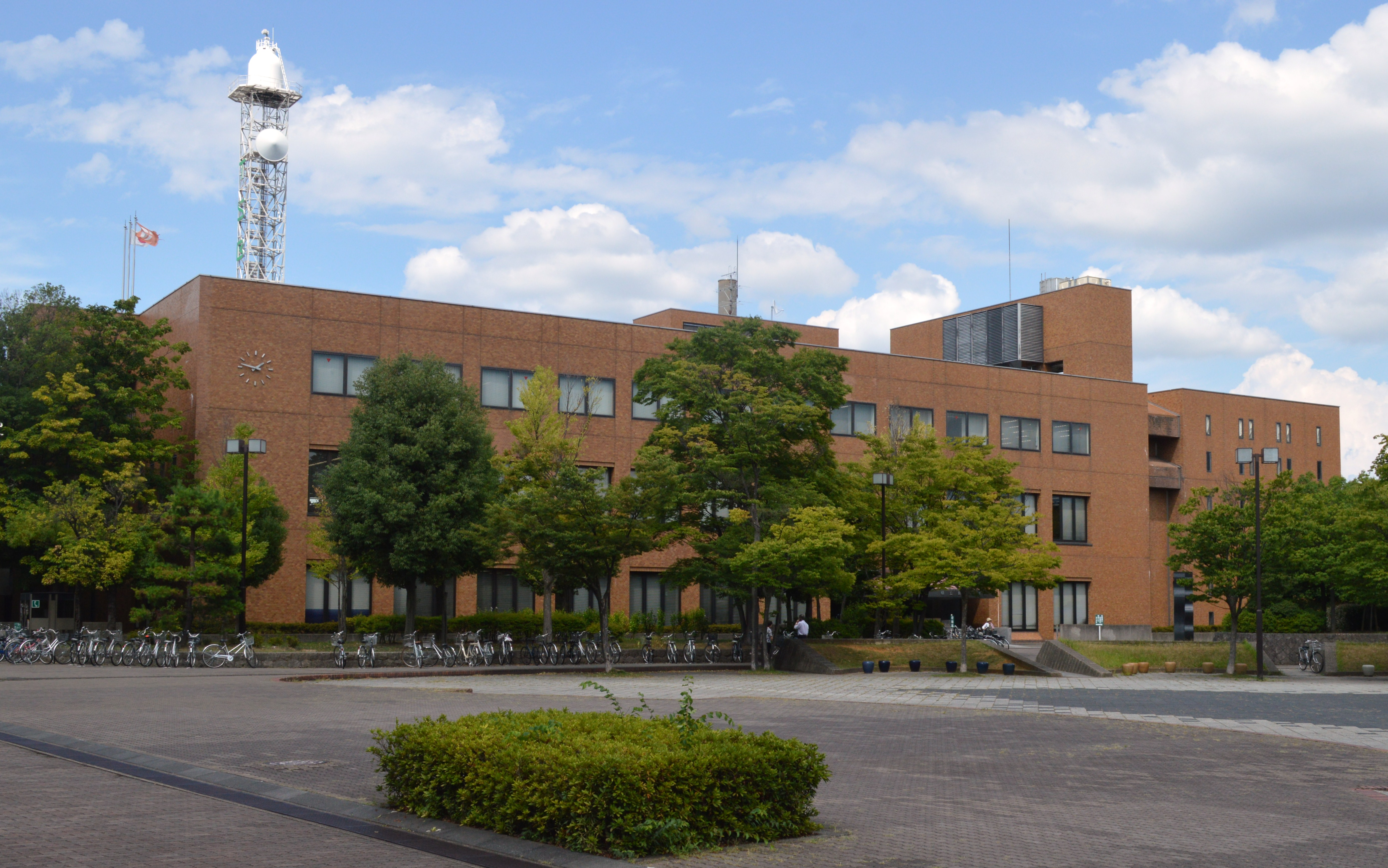 県立長野図書館。